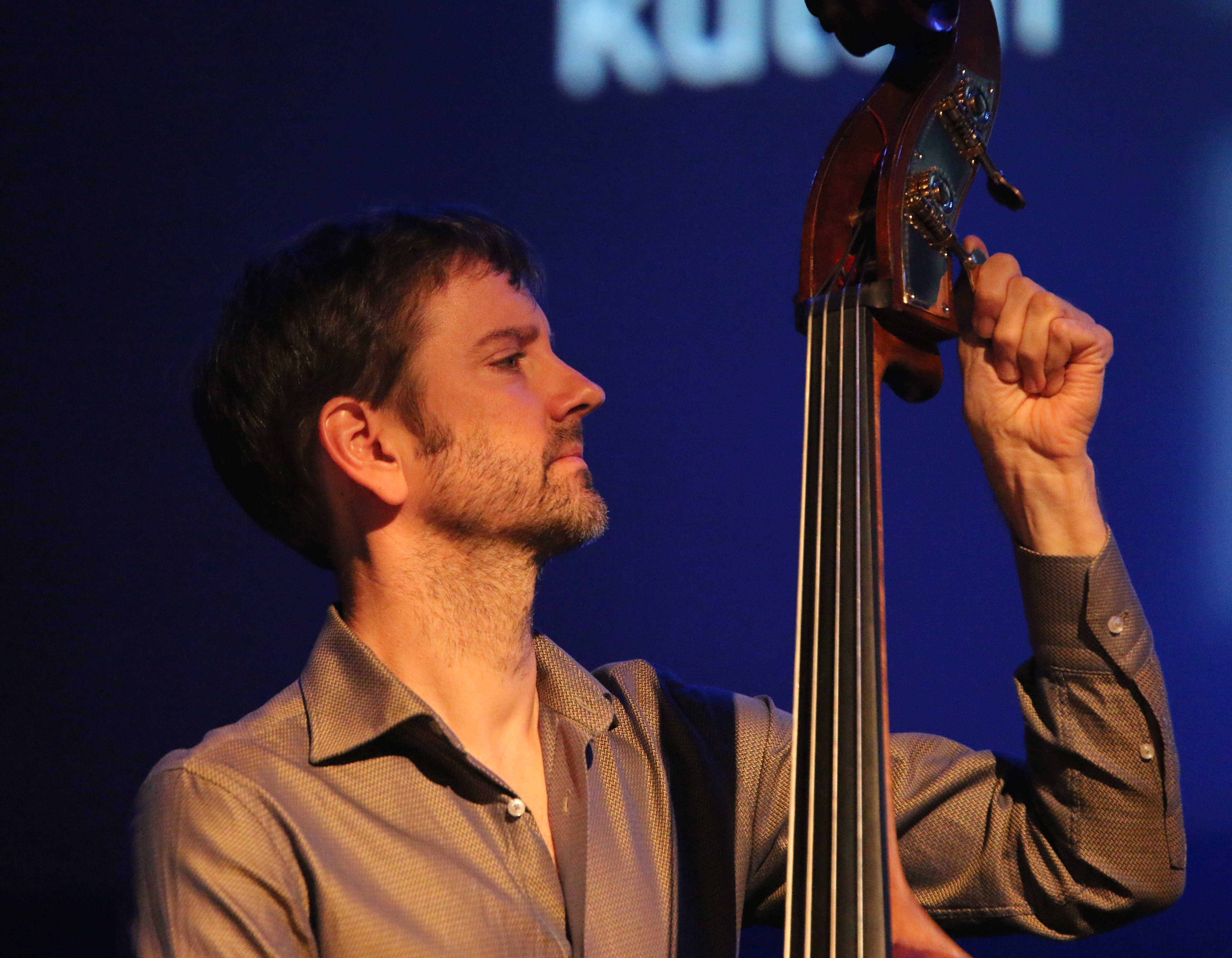 46. Deutsches Jazzfestival Frankfurt 2015: Mark Turner Quartett: Joe Martin